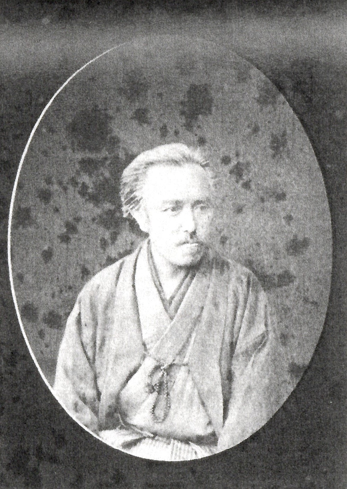 水野勝知の肖像写真。